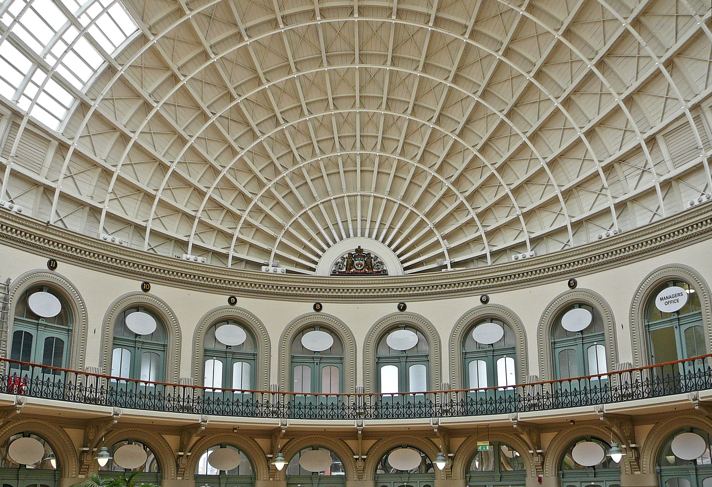 Corn Exchange, Leeds